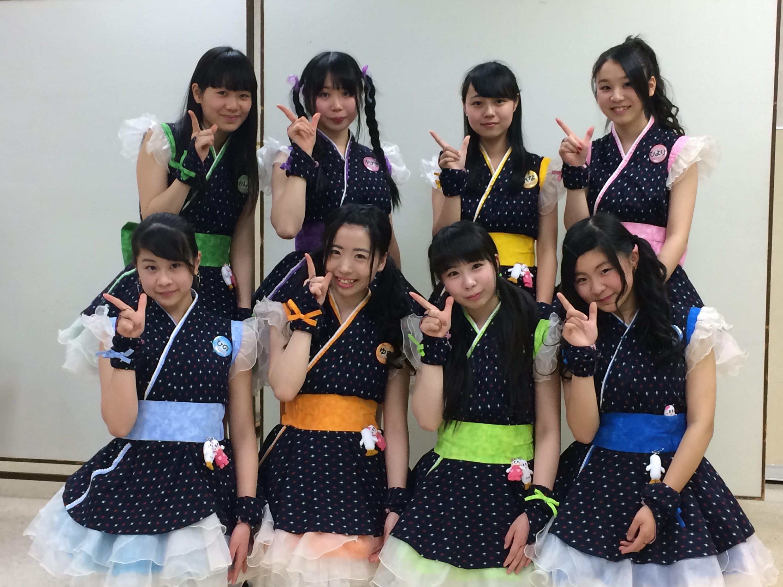 いとくライブ2017年4月30日・まちあわせハチ公ガールズ